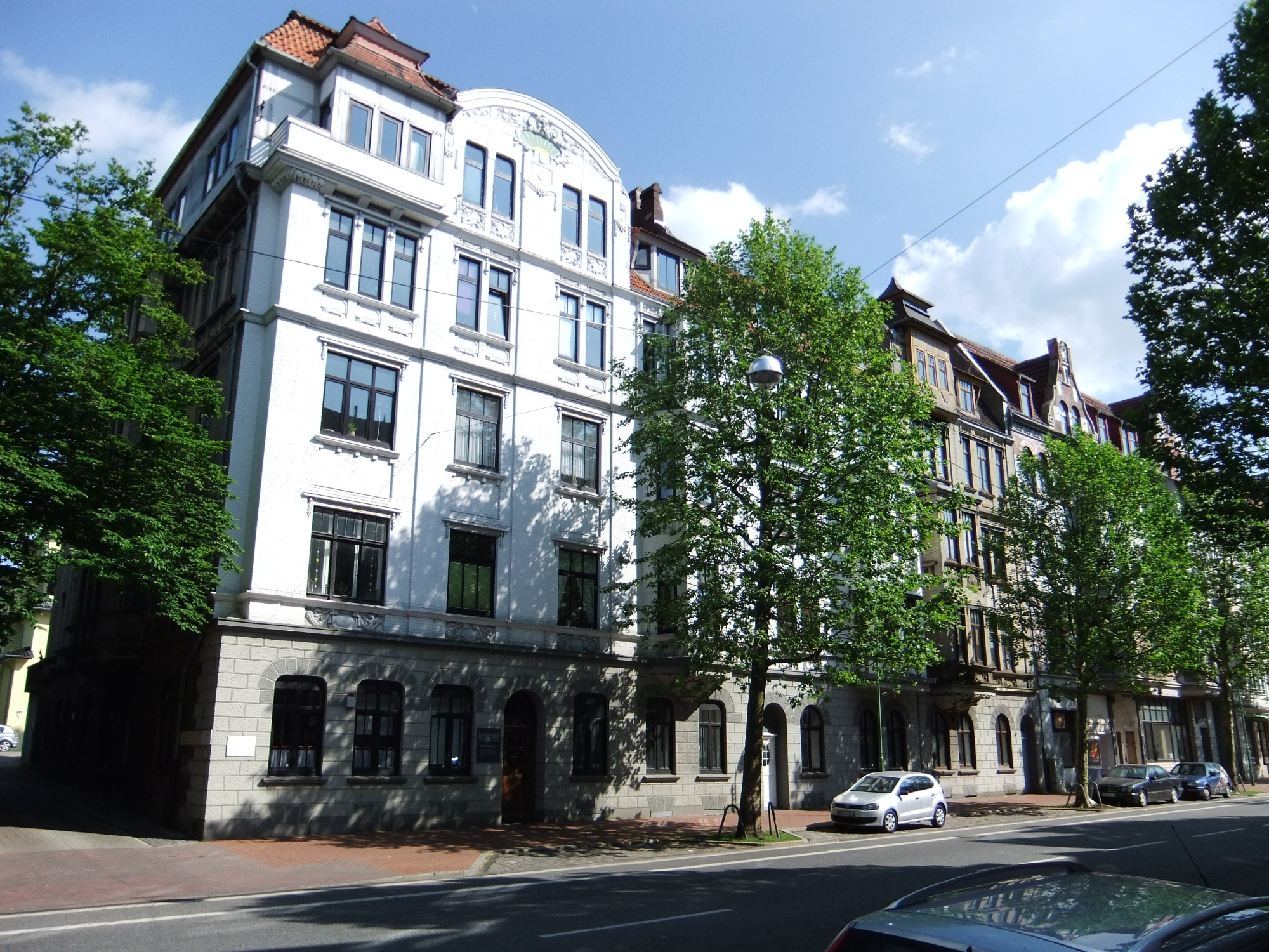 Hafenstraße 48 (weißes Haus links), 46, 44, 42 Das abgebildete Objekt ist ein geschütztes Kulturdenkmal in der Freien Hansestadt Bremen, mit der Nr. 1562 beim Landesamt für Denkmalpflege registriert.